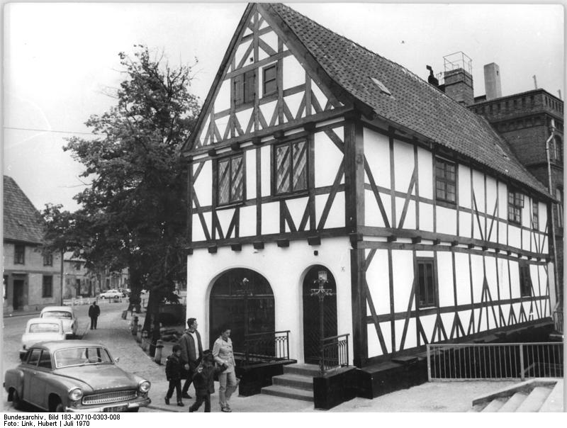 Wismar, Fachwerkhaus Zentralbild Link 18.7.1970 Reizvolles Fachwerkhaus an der "Grube" zu Wismar.